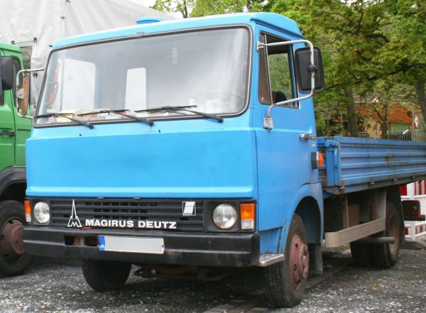 Magirus-Deutz 90M5,3 Pritschenwagen